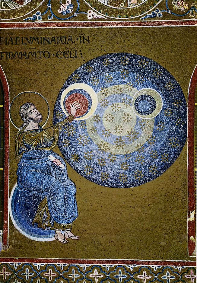 Creation of moon, sun, etc. Бог, сидя на глобусе, сотворяет солнце, луну, звезды и планеты на небесном своде. Byzantine mosaic in Monreale